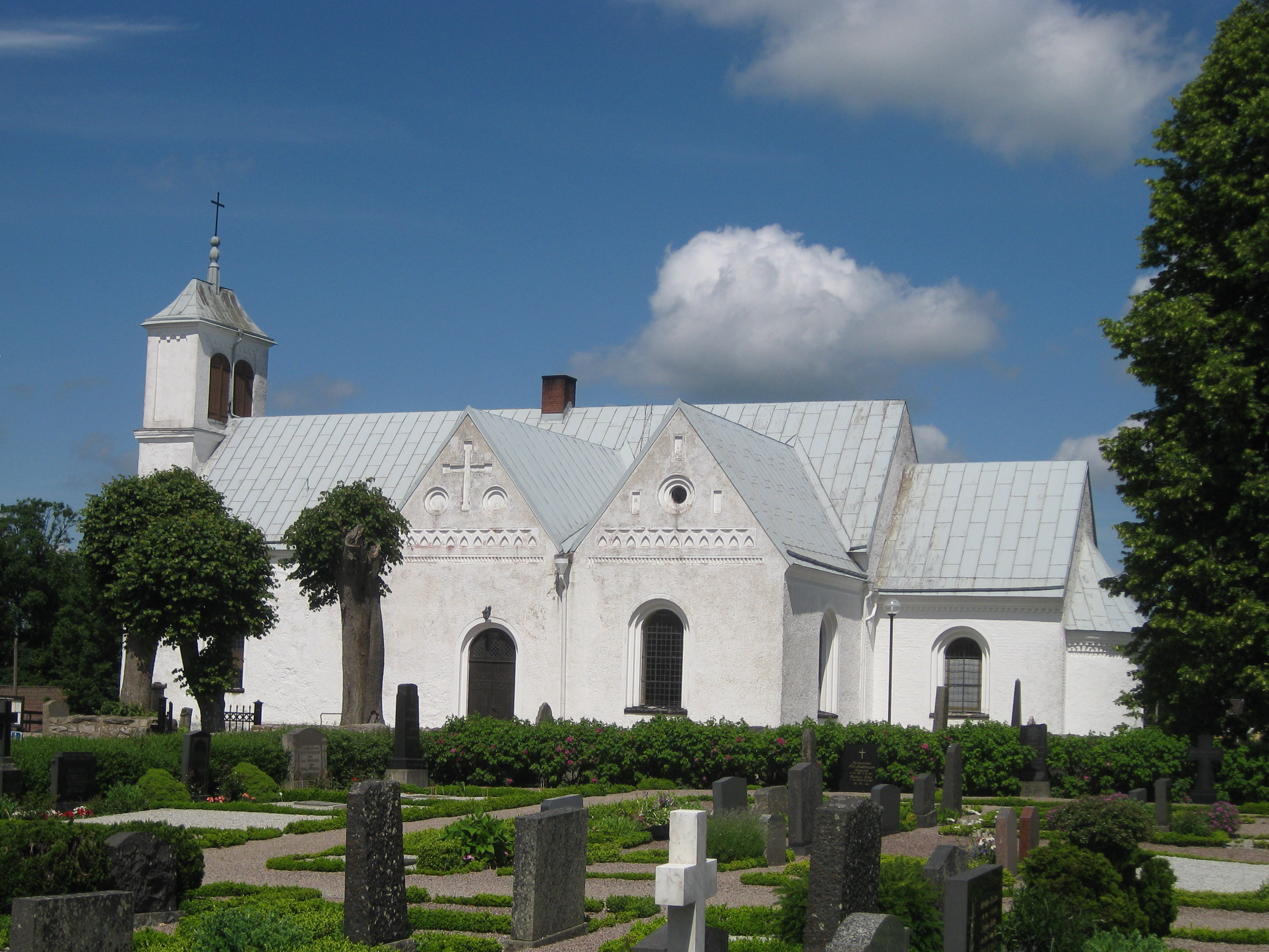 Långaröds kyrka i Hörby kommun